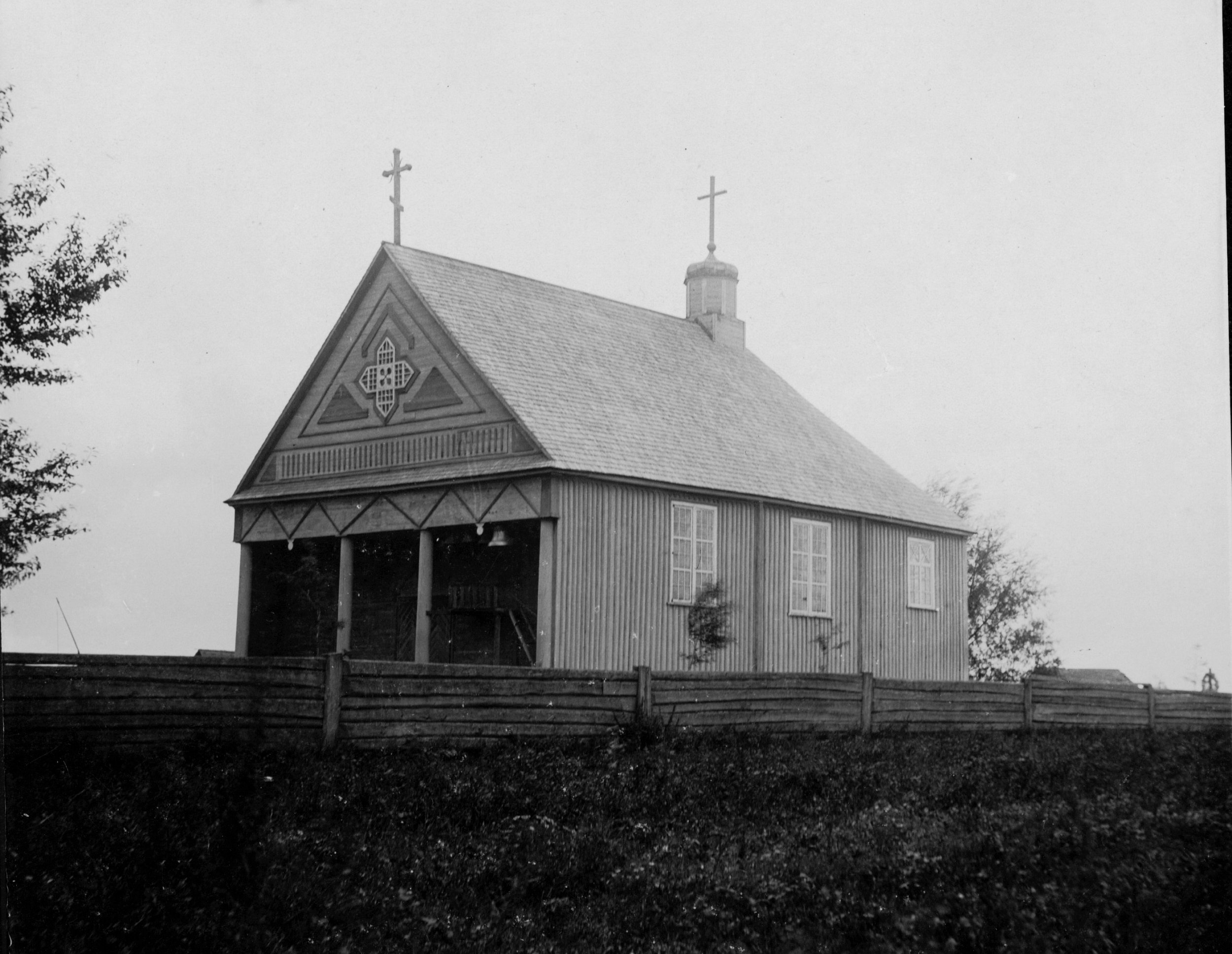 Беларуская (тарашкевіца): Ільля (Illa). Царква